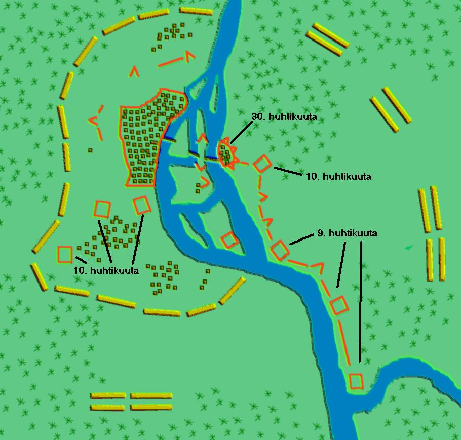 Siege of Magdeburg 1631 (map).